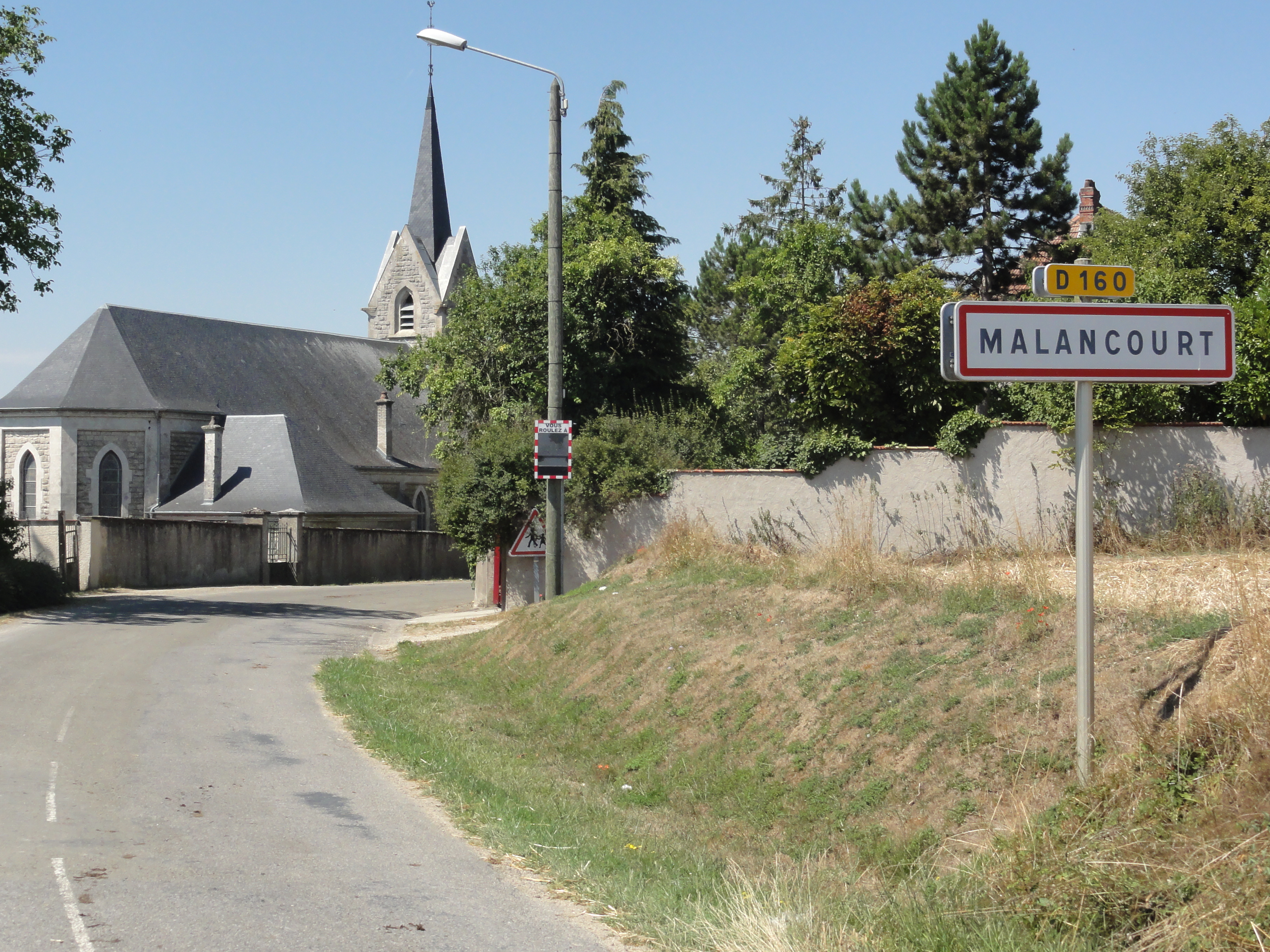 Malancourt (Meuse) city limit sign